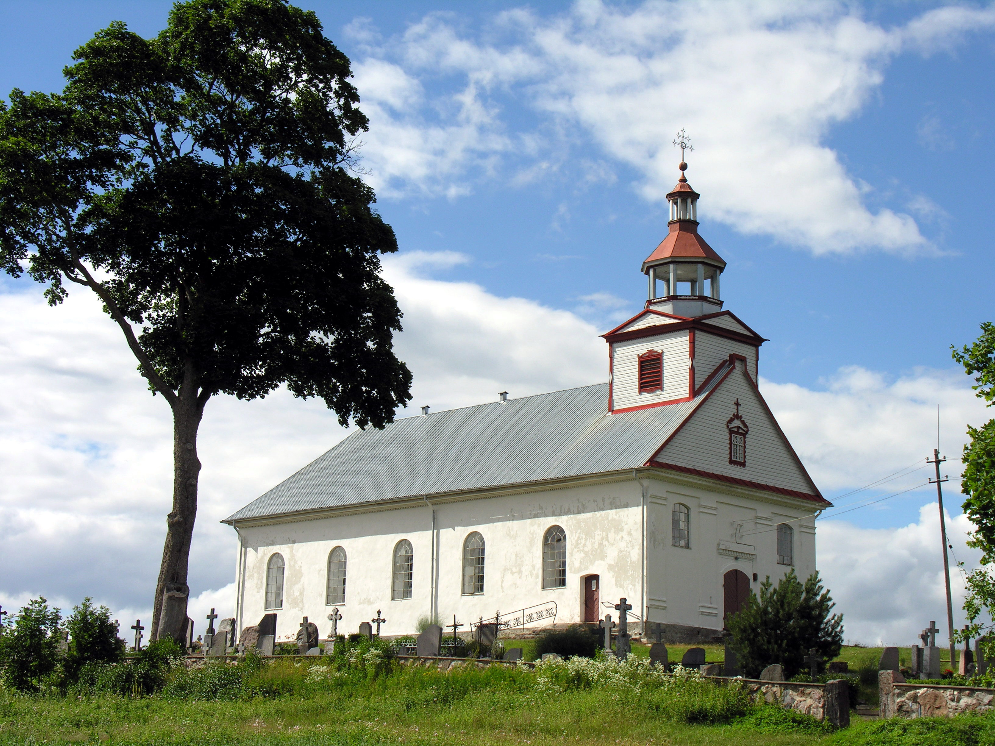 Žemaitėška: Nerimdātē (lt. Nerimdaičiai), Žemaitėjė, 2008-07-17